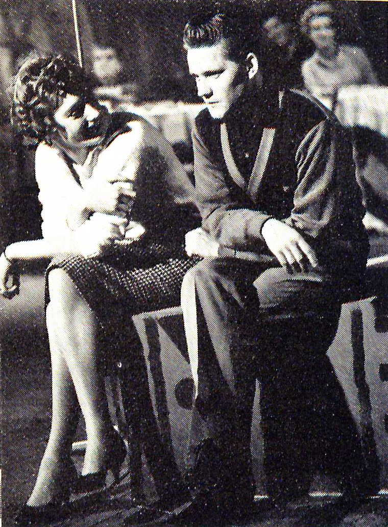 Little Gerhard intervjuas av programledaren Karin Sohlman 1958